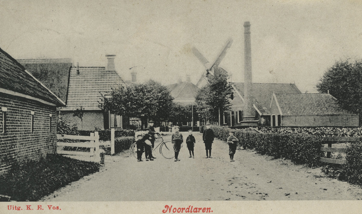 Zuivelfabriek van Noordlaren rond 1908